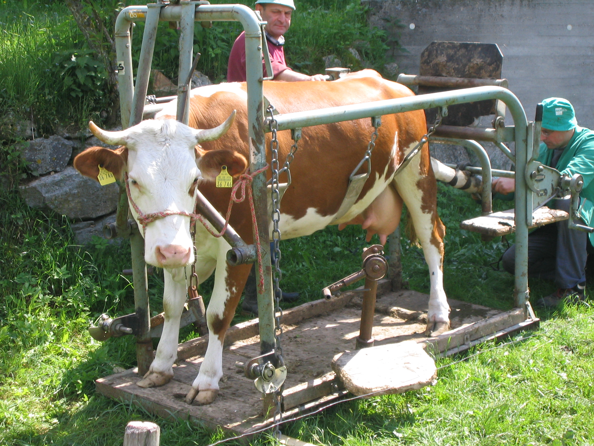 Klauenpflege beim Hausrind